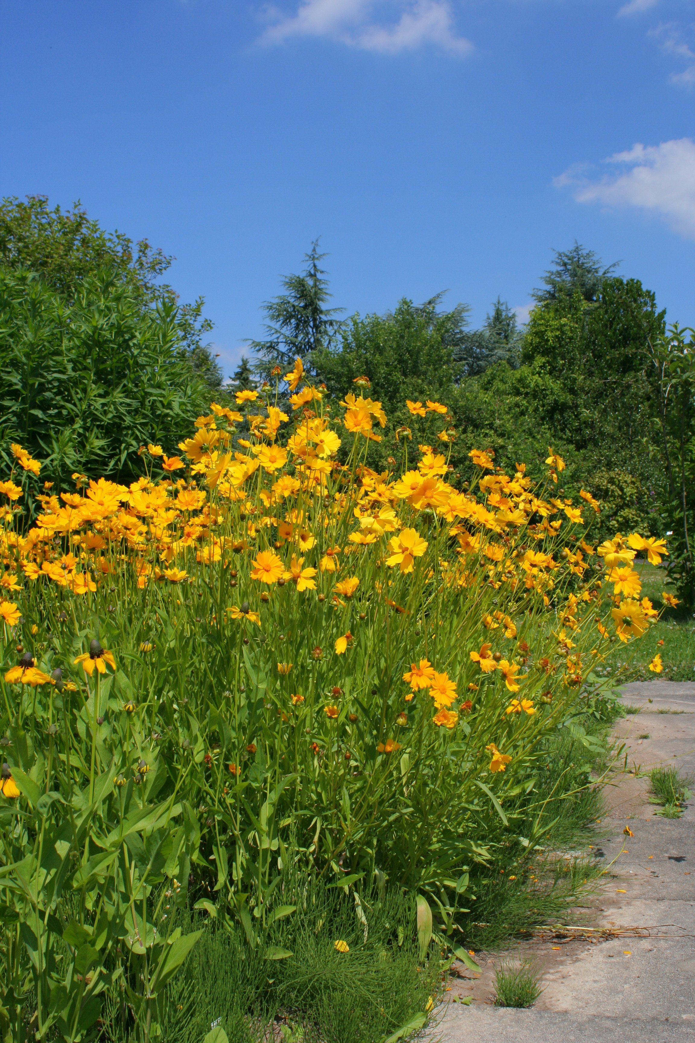 Coreopsis lanceolata, Botanischer Garten Marburg (vorne links: Rudbeckia amplexicaulis)